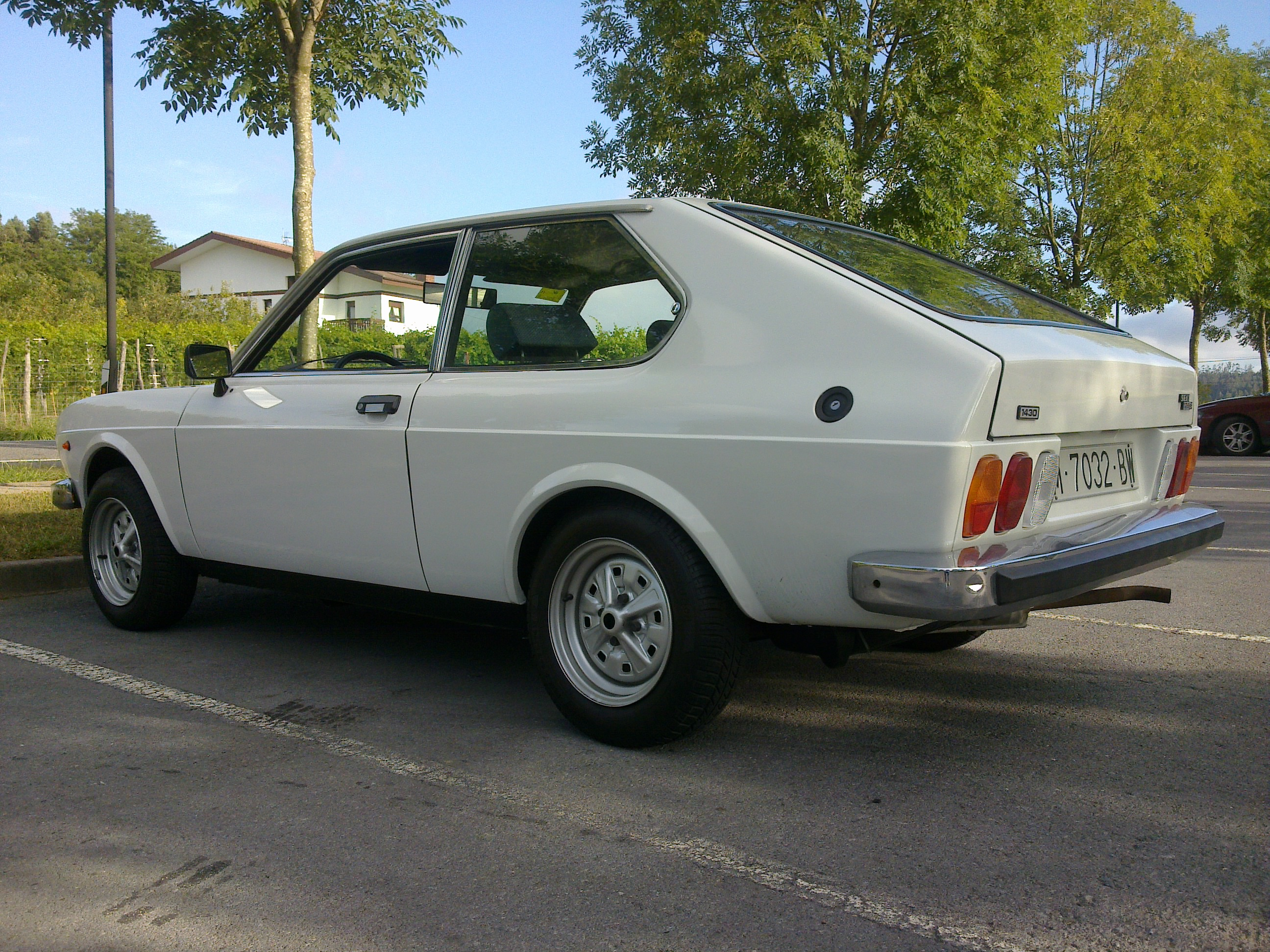 Iñakik eraberritutako autoa.